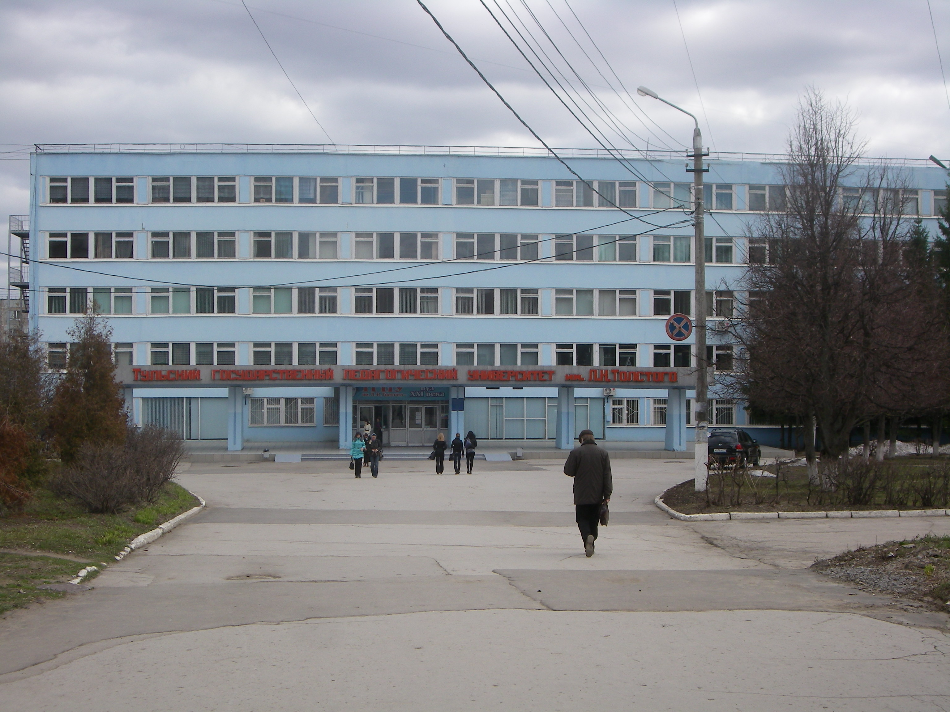 Tula ŝtata pedagogia universitato je nomo de Leo Tolstoj